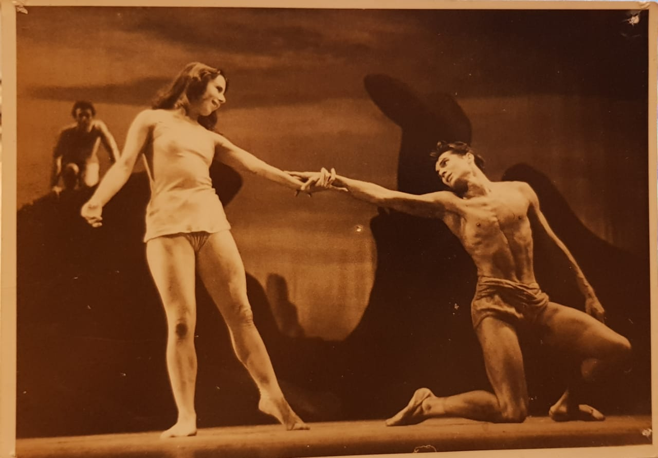 Elsa Galvez como mãe de Cain e Abel no Ballet Russe